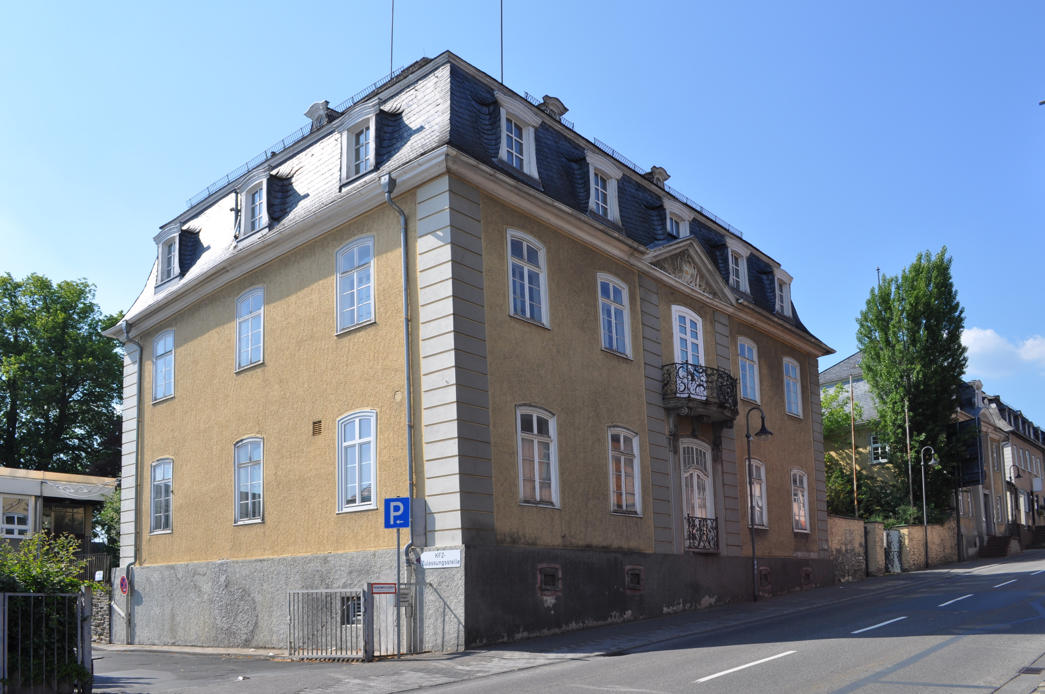 Prinzenpalais in Usingen, ehemaliges Landratsamt des Kreises Usingen. 1768 erwarb Friedrich August von Nassau-Usingen den Freihof am Usinger Obertor. In seinem Auftrag baute der Baumeister Johann Wilhelm Faber aus Biebrich bei Wiesbaden das Palais, das Friedrich August als Prinz mit Ehefrau und Kindern bewohnte. Von Johann Wilhelm Faber stammt auch der bemerkenswerte Frontispiz, das schöne Portal, die leider später verlorene Freitreppe, sowie die Rokokogitter an Treppe und Balkon. Faber war der Nachfolger des nassau-saarbrückischem Generalbaudirektor Friedrich Joachim Stengel. Von Stengel übernahm Faber auch 1771 die Bauleitung der evangelischen Kirche von Jugenheim. Nachdem Friedrich August, dank Napoleon 1803 Fürst geworden war, wechselte er seinen Wohnsitz in das Biebricher Schloss. Das Prinzenpalais wurde an den Posthalter und Weinhändler Graf aus Birstein verkauft.